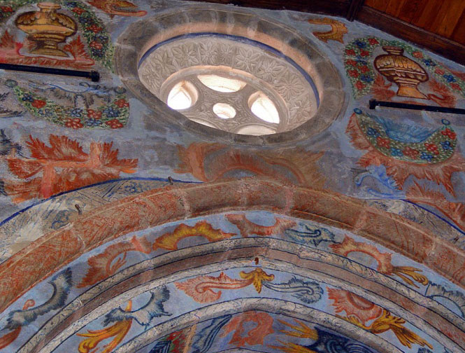 Ábside da Igreja de S. Pedro de Abragão - Penafiel Fundada no século XII, a igreja foi remodelada na centúria seguinte, tendo sofrido grandes alterações nos séculos XVII e XVIII, altura em que foi reconstruída já em estilo barroco. No templo destacam-se ainda a pintura polícroma da capela-mor com motivos vegetalistas, os retábulos maneiristas e barrocos, com altares de talha dourada, e os dois túmulos medievais. This file was uploaded for Wiki Loves Monuments in Portugal with the unique identifier 71192.